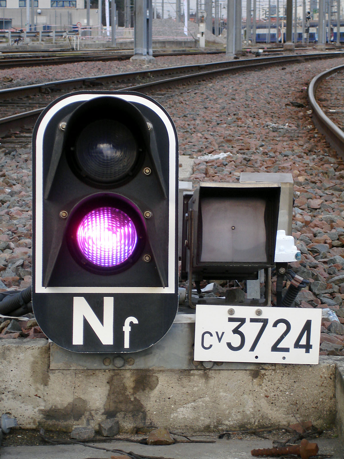 Carré violet au technicentre Paris Nord-Joncherolles, Villetaneuse, Seine-Saint-Denis, France.